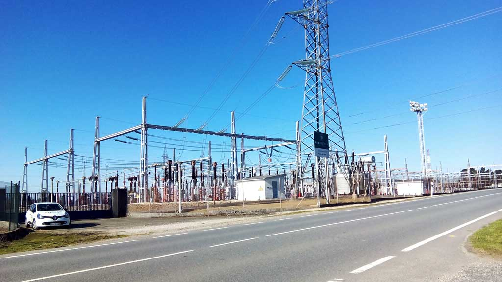 Instalacións de REE en Mesón do Vento, As Travesas.